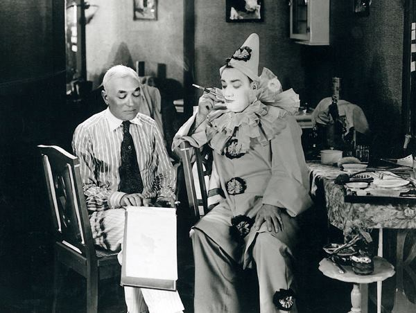 GRANDE ENRICO CARUSO